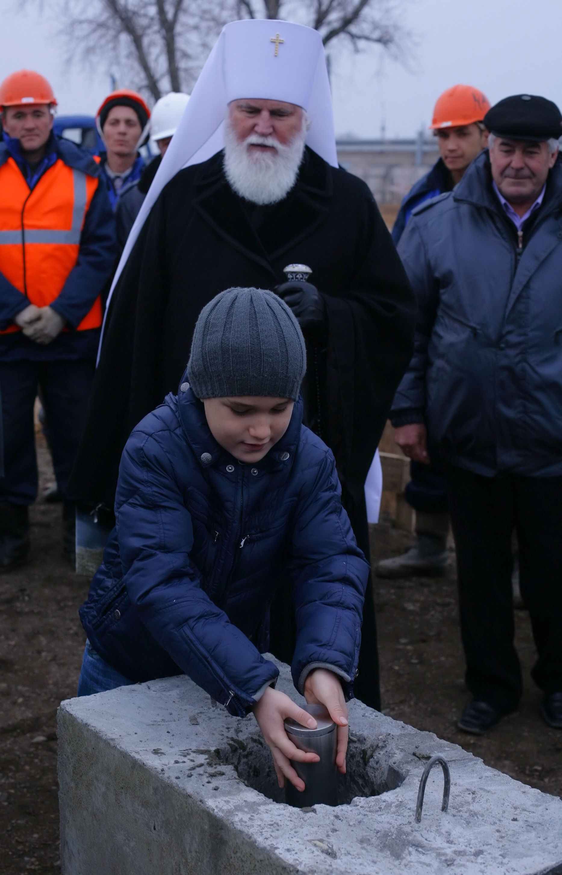 Митрополит Оренбургский и Саракташский Валентин и Виктор Черномырдин устанавливают капсулу с посланием потомкам в нишу закладного камня в основание Историко-мемориального музея Виктора Степановича Черномырдина. Оренбургская область, село Чёрный Отрог, 2 ноября 2011 года. Из фондов Историко-мемориального музея Виктора Степановича Черномырдина.